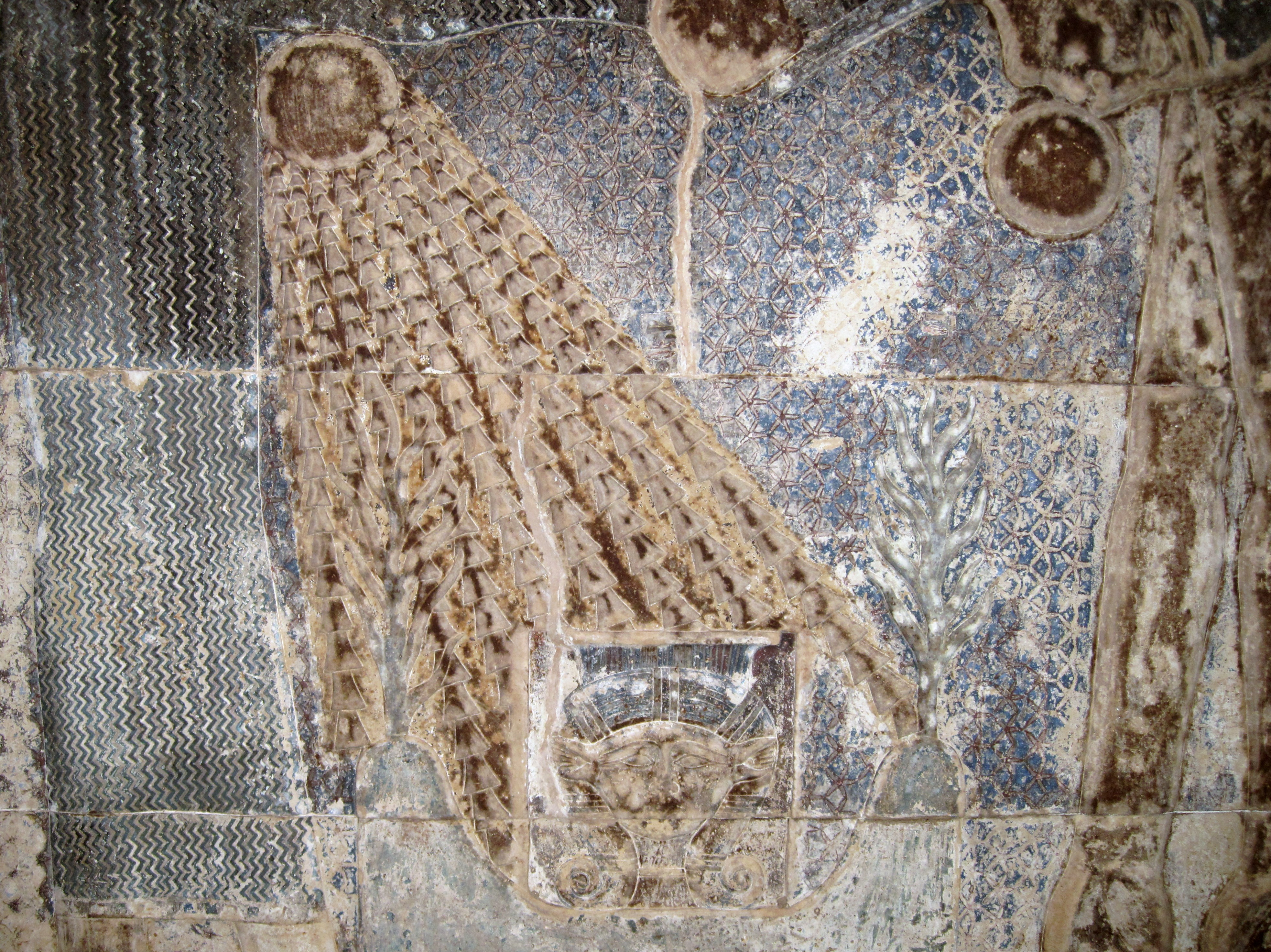 Deckenbild der Himmelsgöttin Nut und der Geburt der Sonne im Wabet des Hathor-Tempels von Dendera, Ägypten